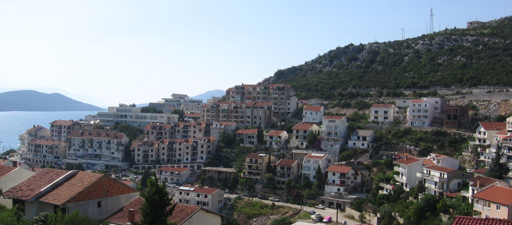 Neum in Bosnia and Herzegovina